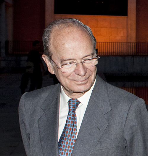 Ibon Areso, Juan José Muguruza (presidente Adype) e Iñigo Urkullu